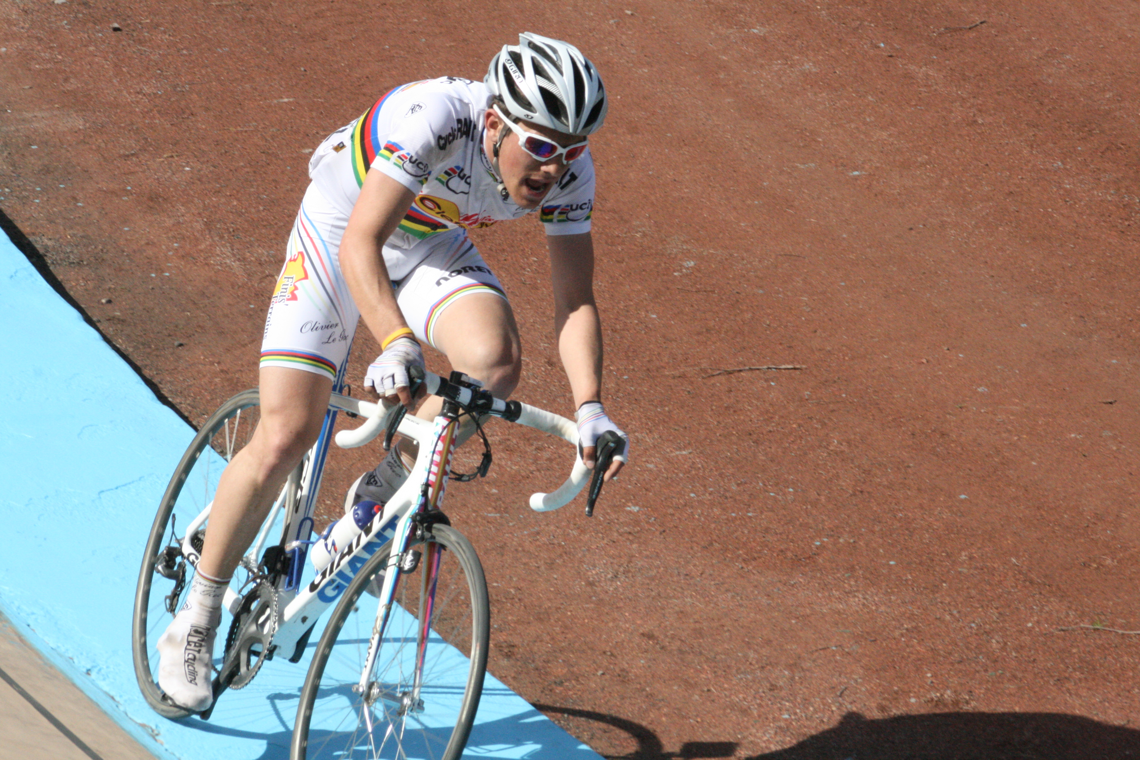 Arrivée de Paris-Roubaix 2011 au vélodrome de Roubaix Olivier Le Gac